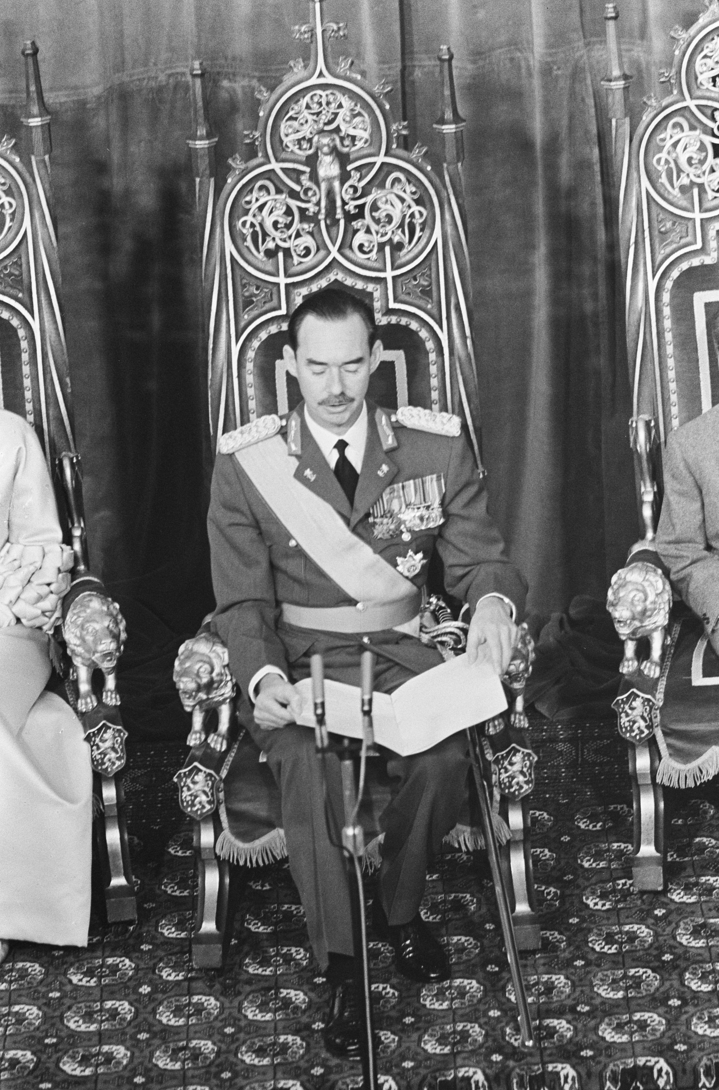 Collectie / Archief : Fotocollectie Anefo Reportage / Serie : [ onbekend ] Beschrijving : De troonwisseling in Luxemburg, de Hertogelijke familie Datum : 12 november 1964 Locatie : Luxemburg Trefwoorden : families, troonwisselingen Fotograaf : Nijs, Jac. de / Anefo Auteursrechthebbende : Nationaal Archief Materiaalsoort : Negatief (zwart/wit) Nummer archiefinventaris : bekijk toegang 2.24.01.05 Bestanddeelnummer : 917-1199